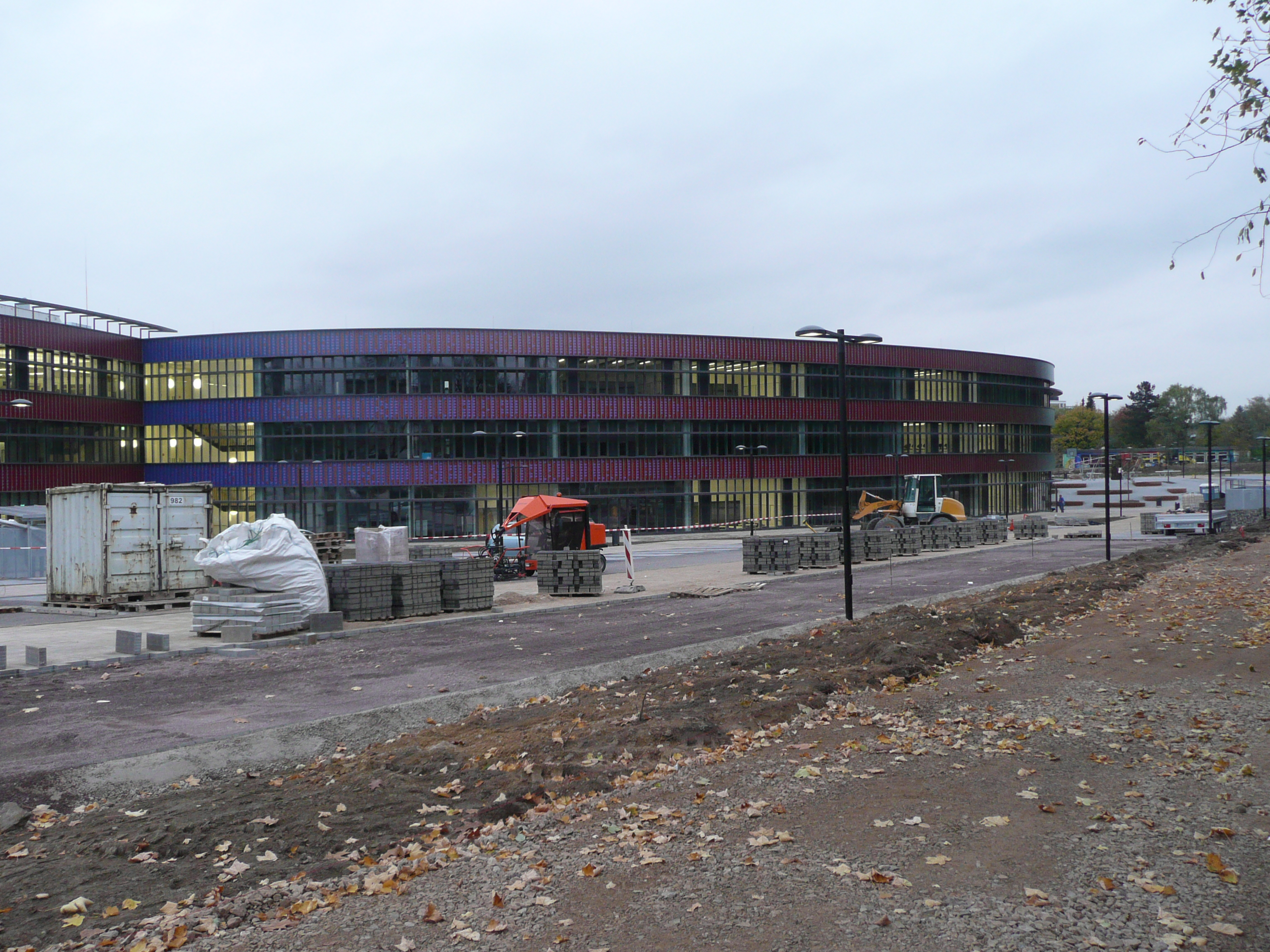 Neues Gymnasium Bochum, Bauzustand Oktober 2012